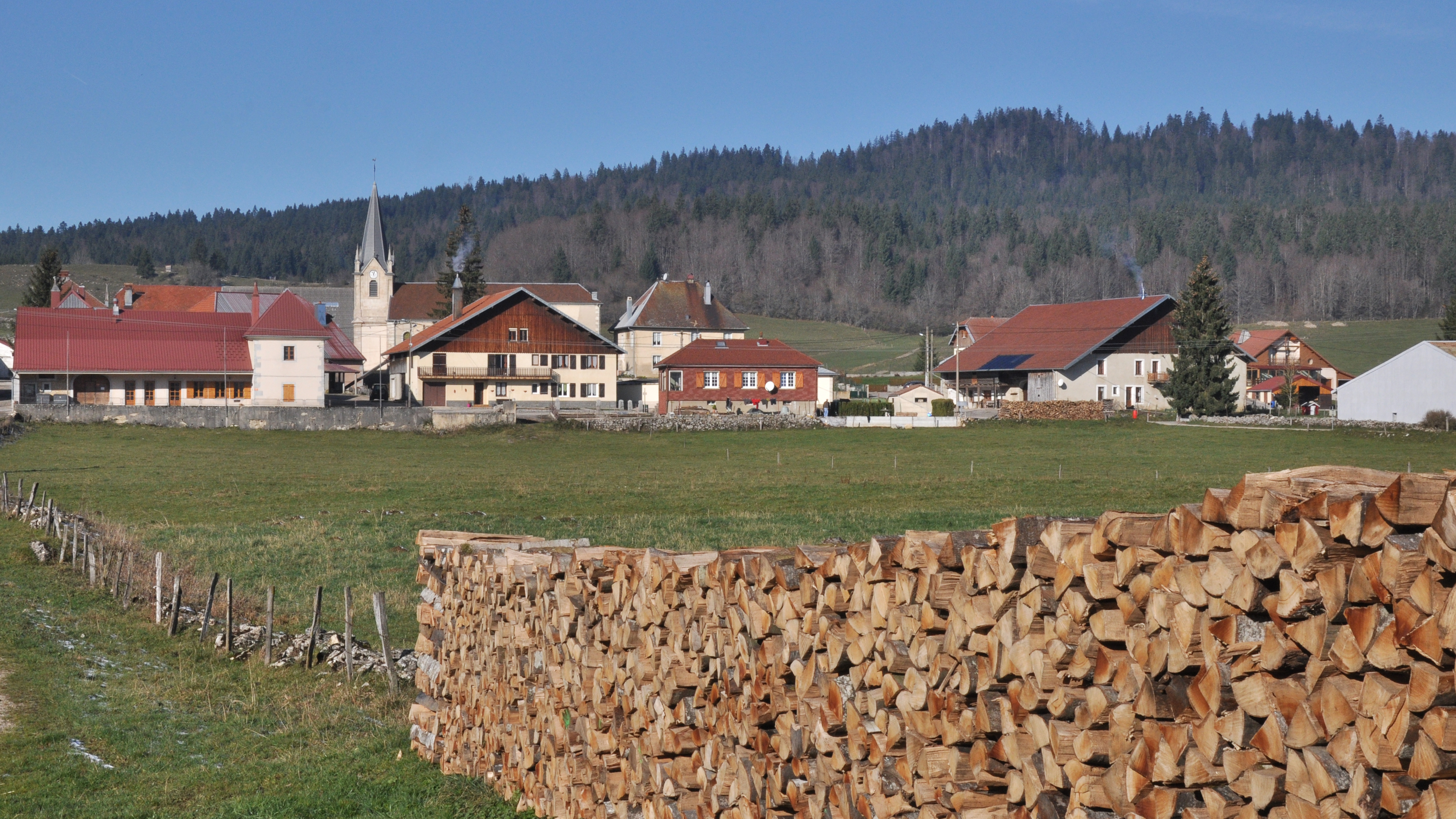 LES PONTETS F25240